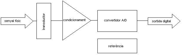 Esquema conversio A/D